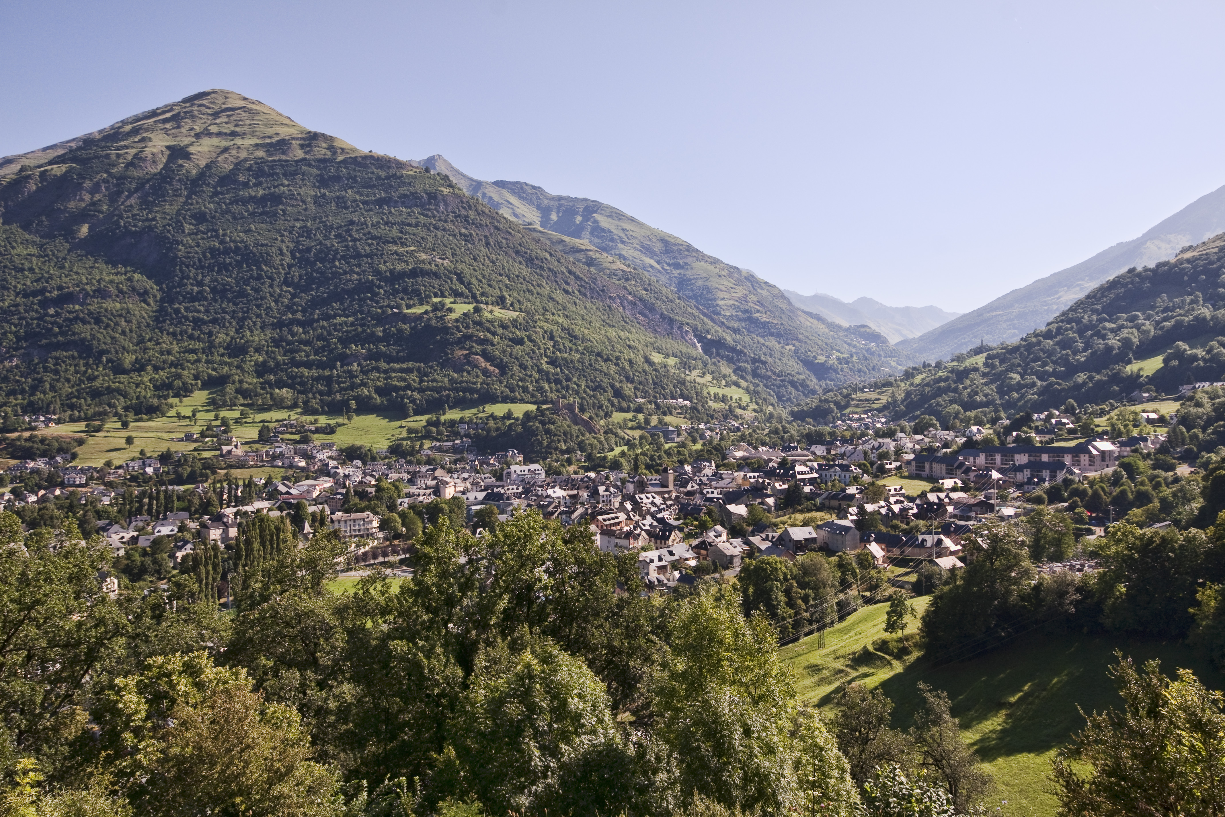 Vue de Luz-Saint-Sauveur, Hautes Pyrénées